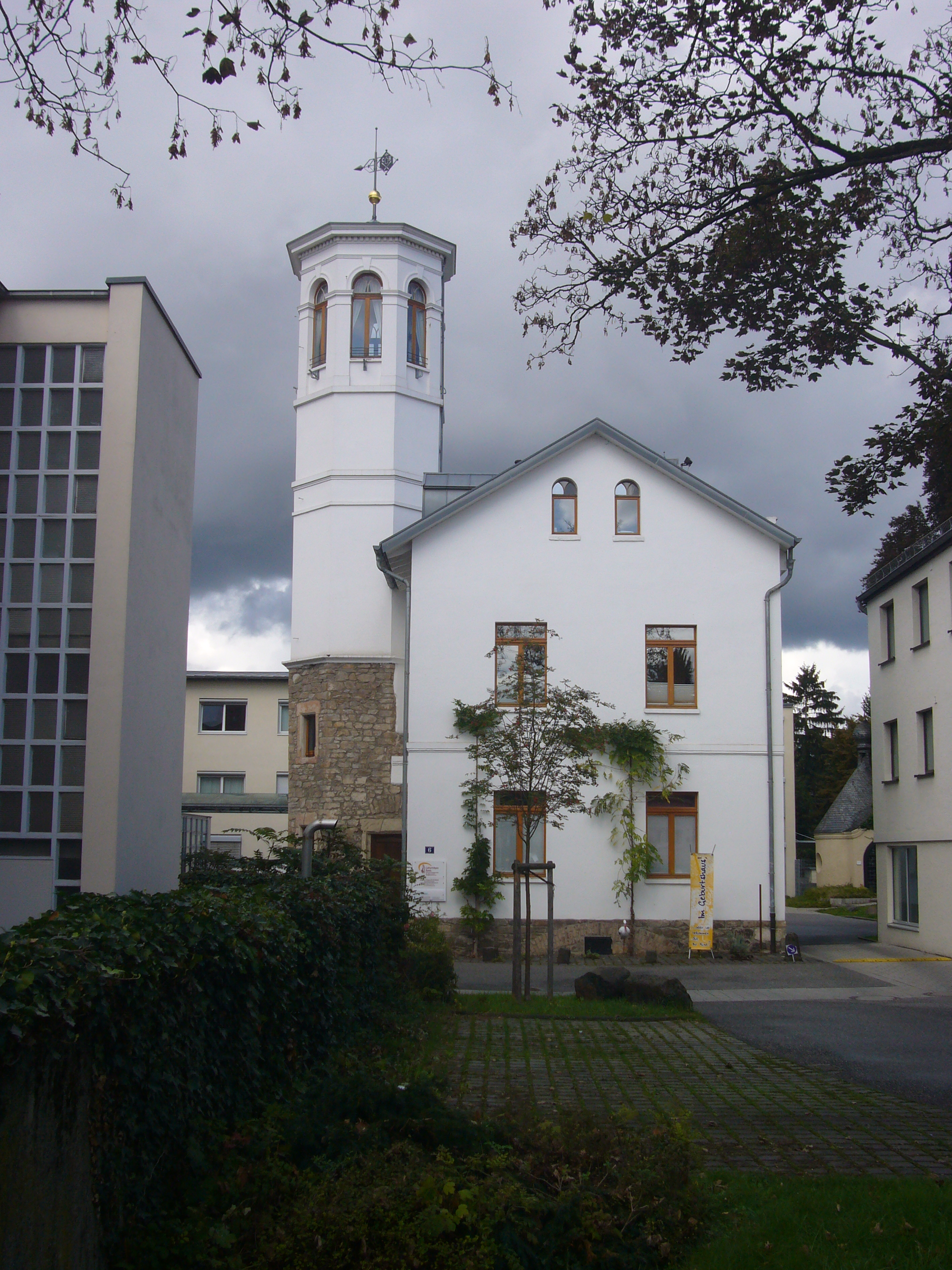 Die ehemalige Villa Baunscheidt und sogenannte Burg Dottendorf in Bonn-Dottendorf